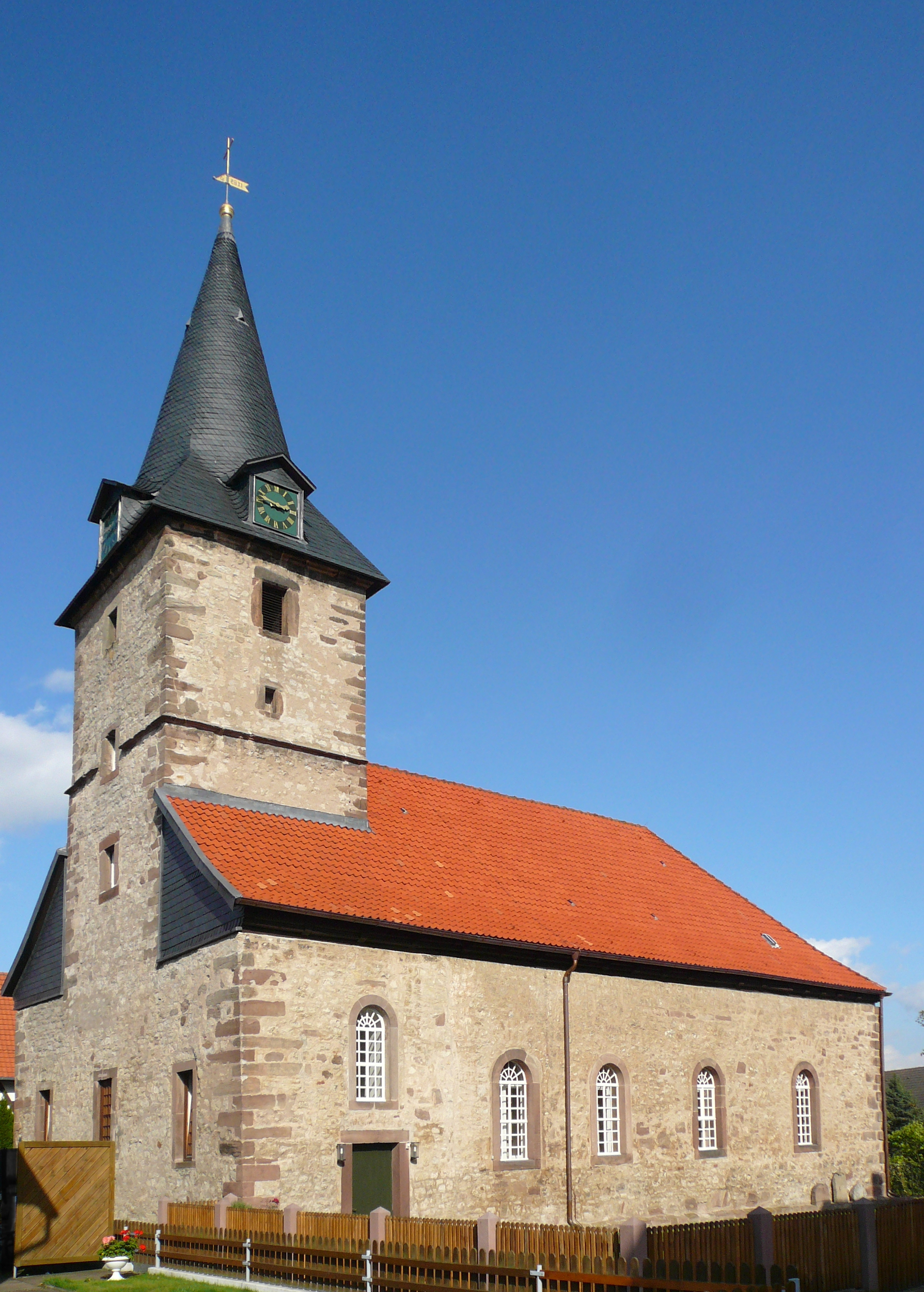 Ev.-luth. Kirche St. Nicolai in Gladebeck, Stadt Hardegsen, Niedersachsen. Im Kern romanisch, Westbau und Turm noch (teilweise) mittelalterlich, größere Umgestaltungen Anfang 17. Jahrhundert und 1734, Datierung Wetterfahne "1785"